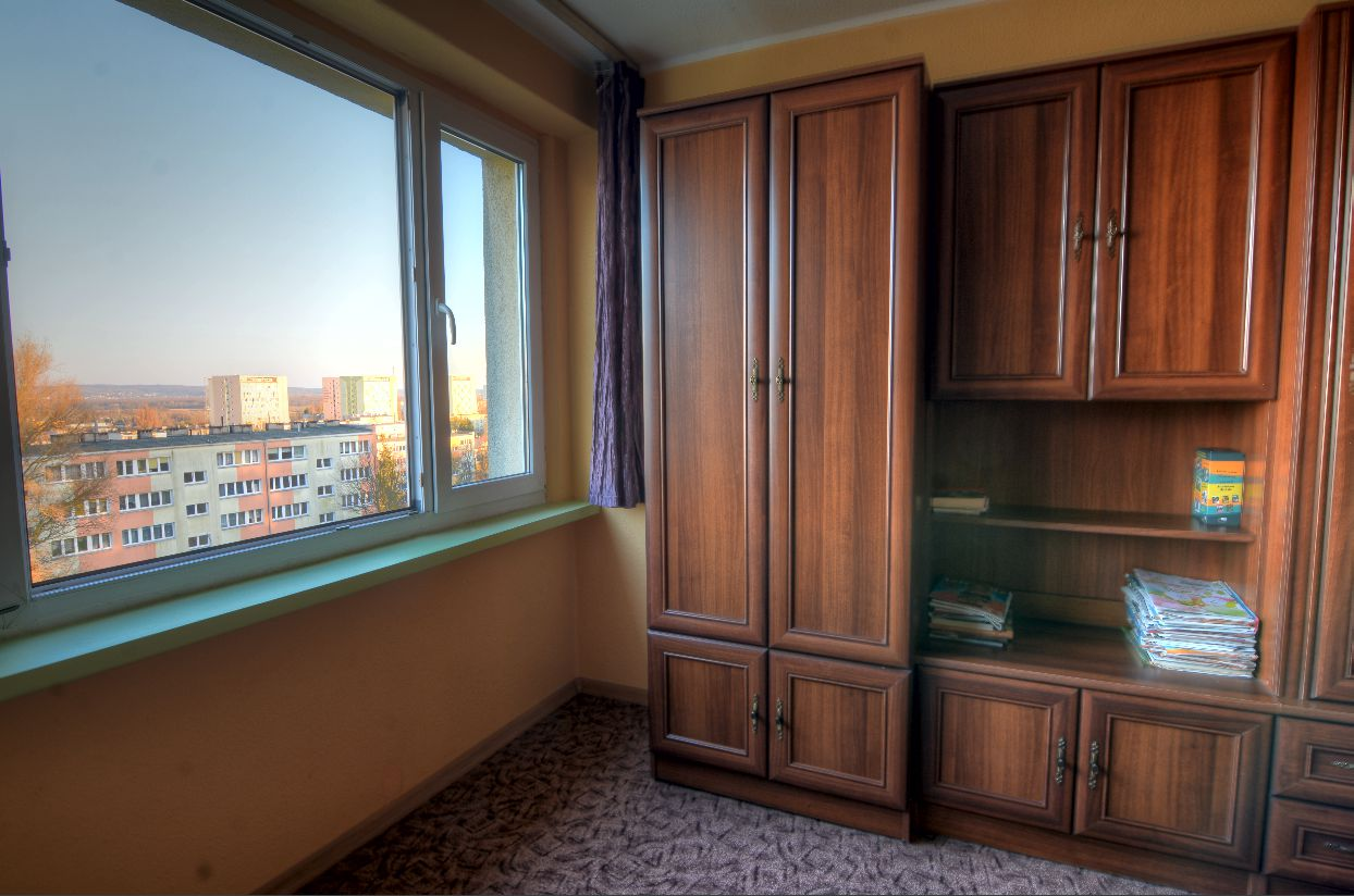 Zdjęcie stworzone z wykorzystaniem techniki HDR